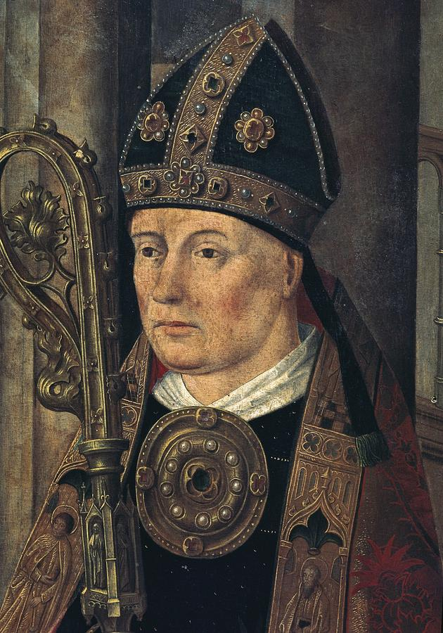 Philippe de Vitry, inventeur de l'Ars nova.